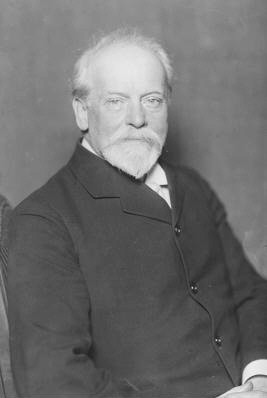 Paul Kupelwieser (1843 - 1919), Rakousko-Uherský průmyslník.